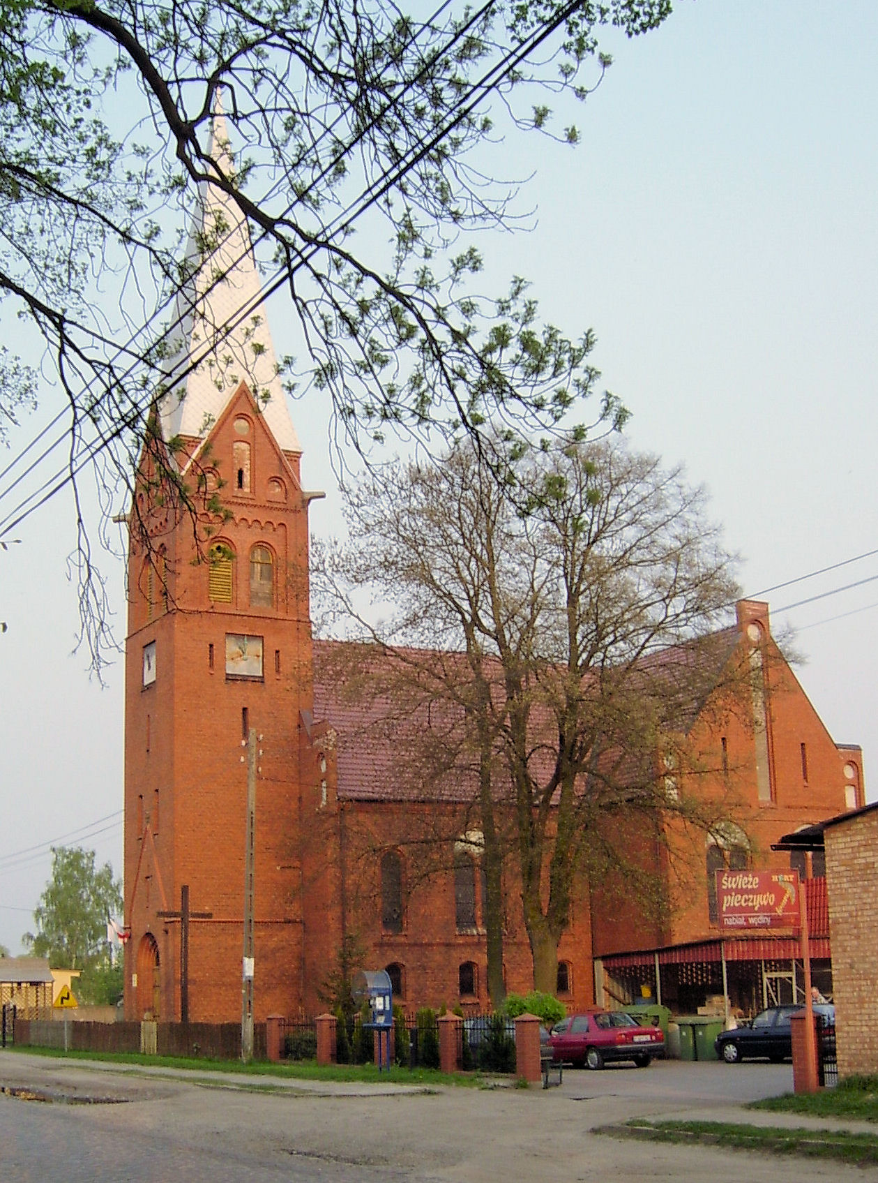 Gościm - kościół filialny p.w. Niepokalanego Poczęcia NMP z 1897 r. (zabytek nr L-53)